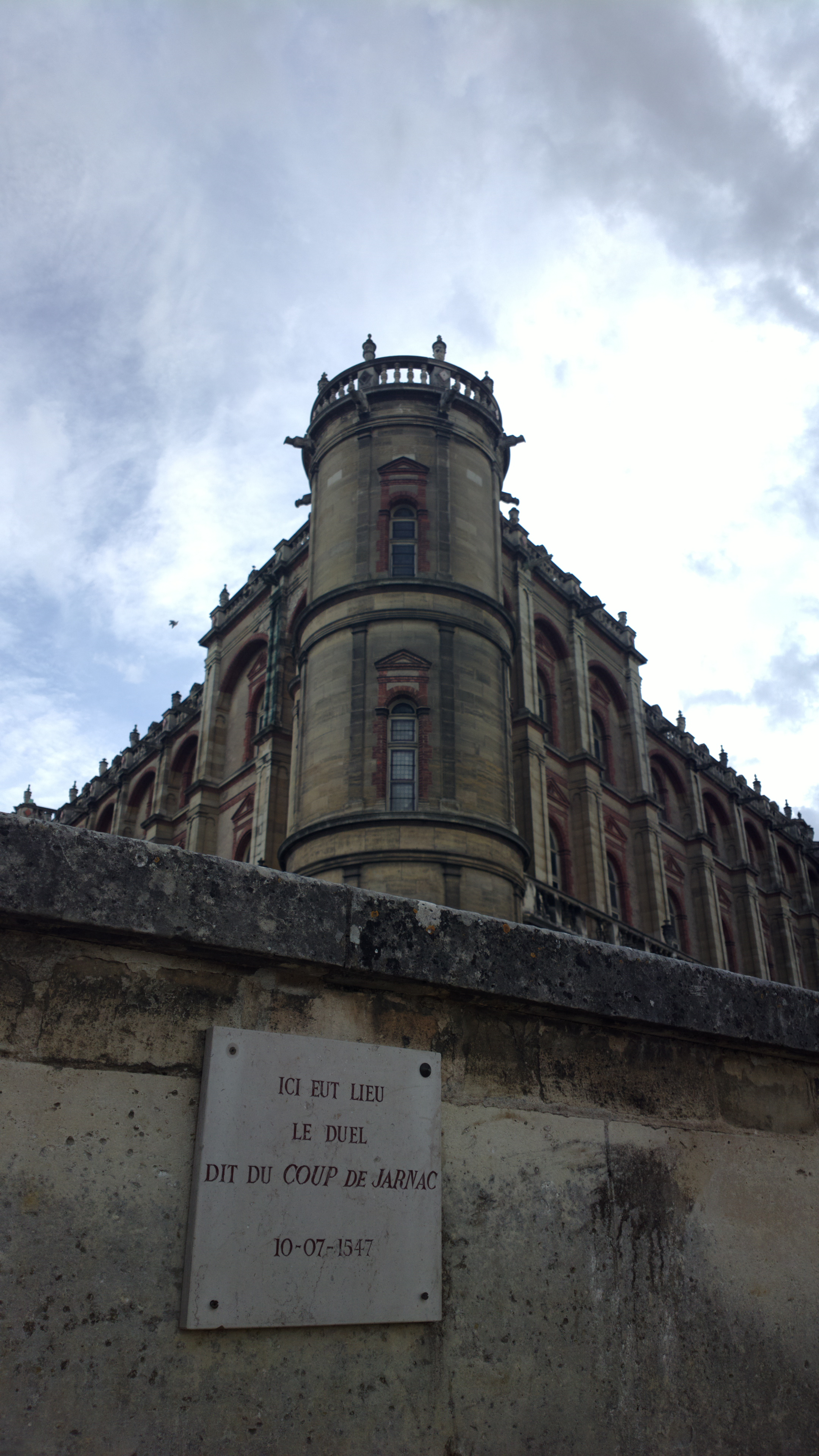 Lieu du duel dit du Coup de Jarnac. Château Vieux situé place Charles de Gaulle à Saint-Germain-en-Laye en France. Abrite le Musée d'archéologie nationale. .